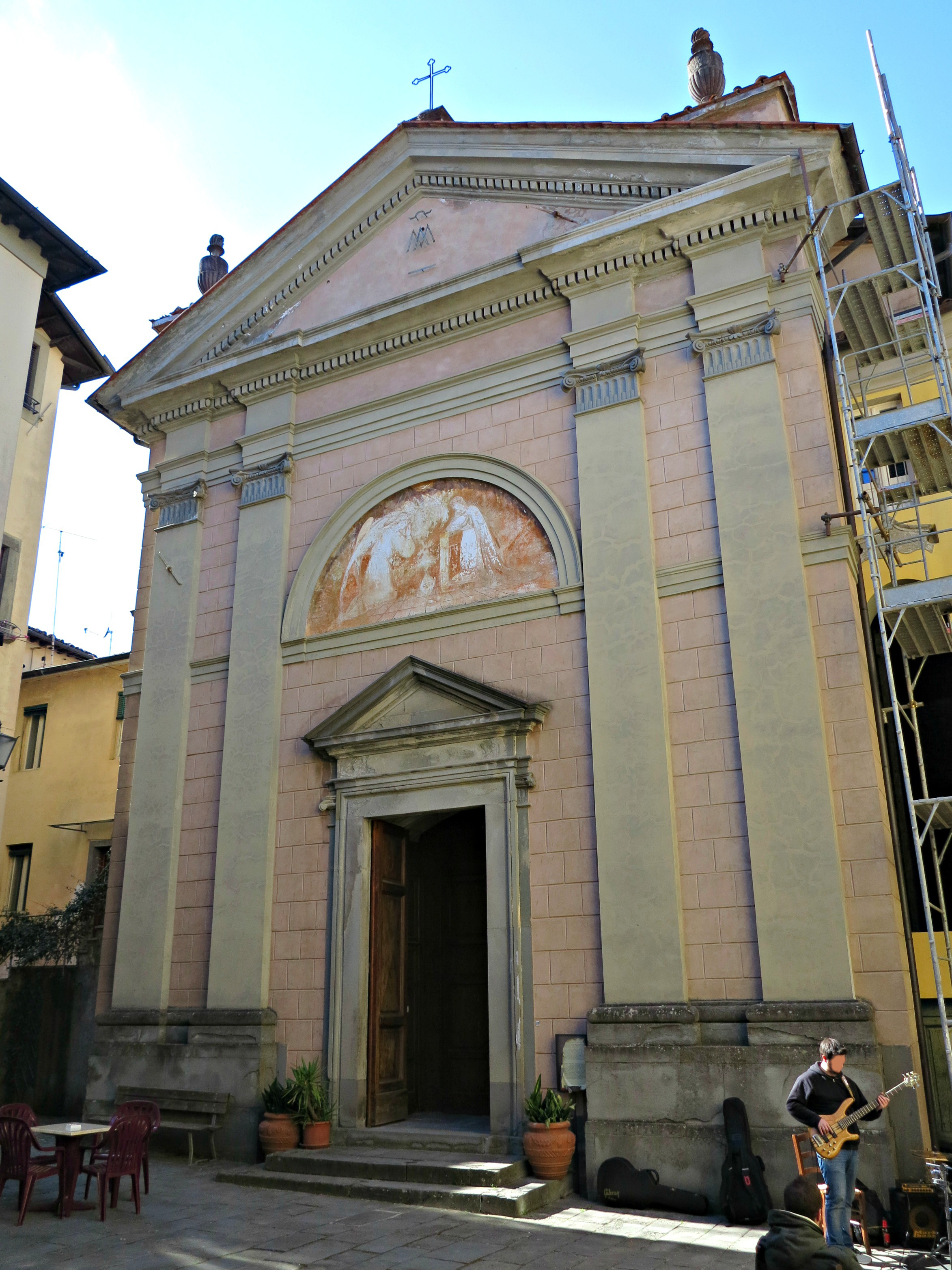 Esterno della chiesa della Santissima Annunziata, Barga